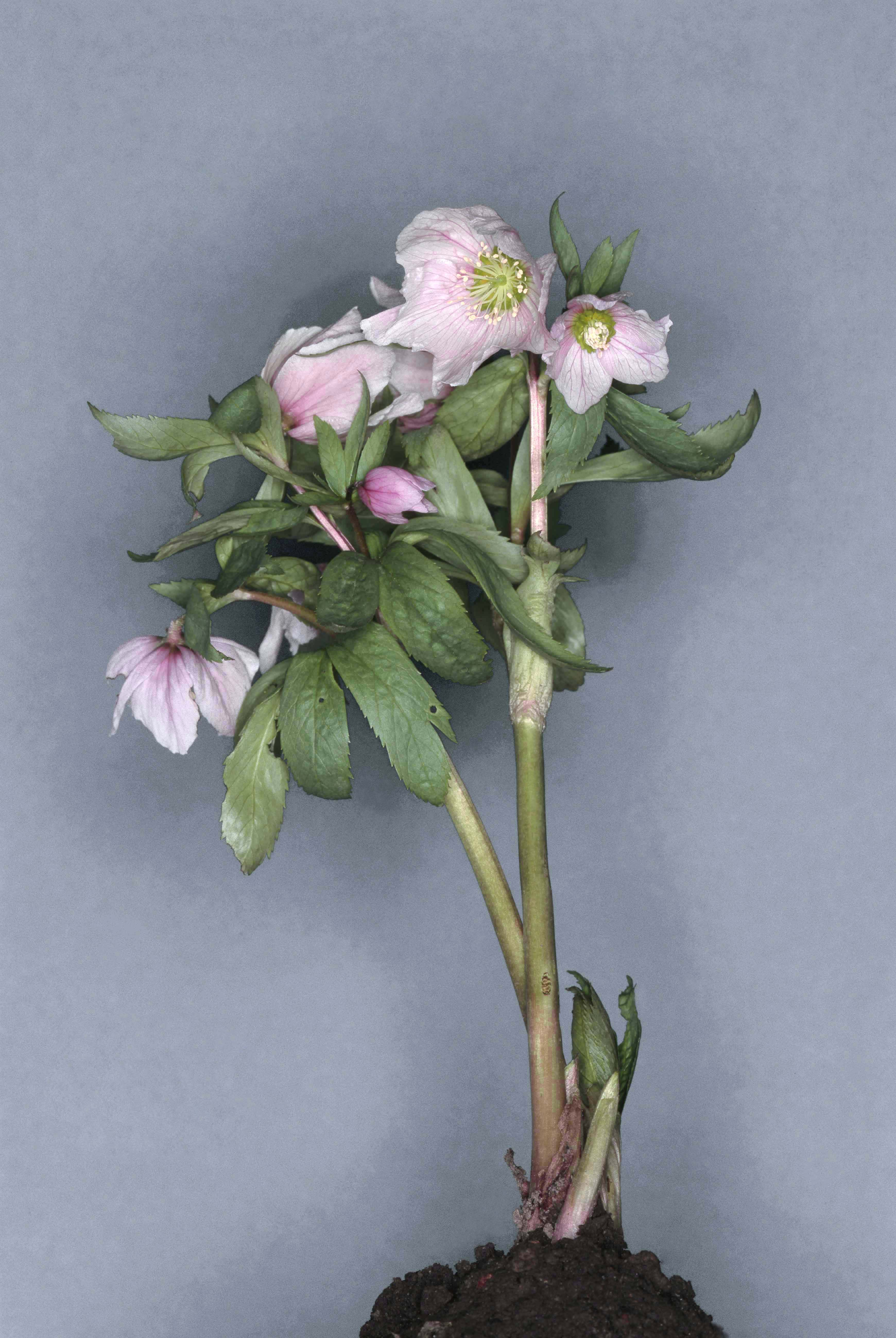 Tibet-Nieswurz (Helleborus thibetanus)